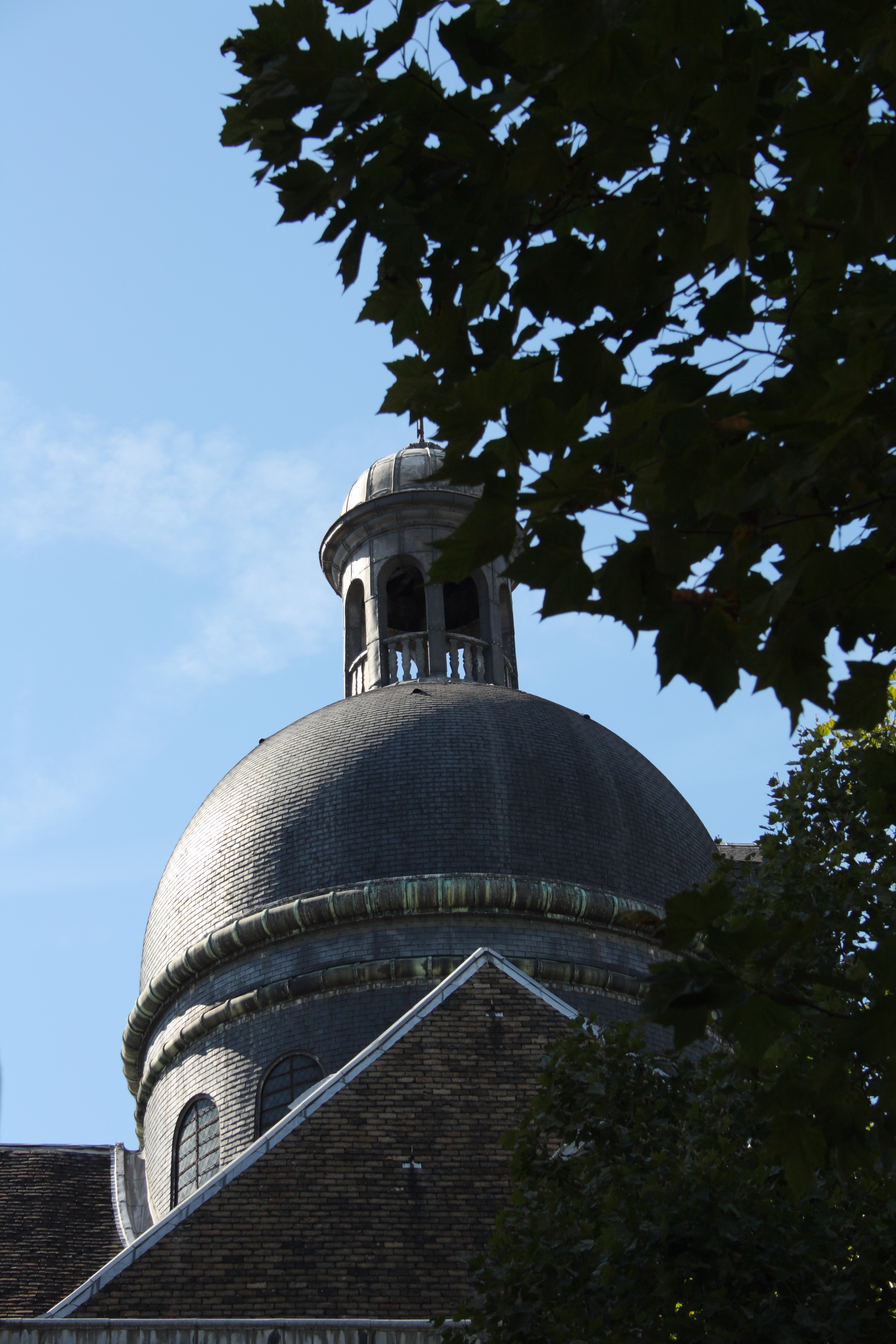 Katholische Kirche Saint-Joseph-des Carmes, ehemalige Kirche der Unbeschuhten Karmeliten, 70, rue de Vaugirard im 6. Arrondissement in Paris, Kuppel Object location48° 50′ 54.31″ N, 2° 19′ 45.8″ E